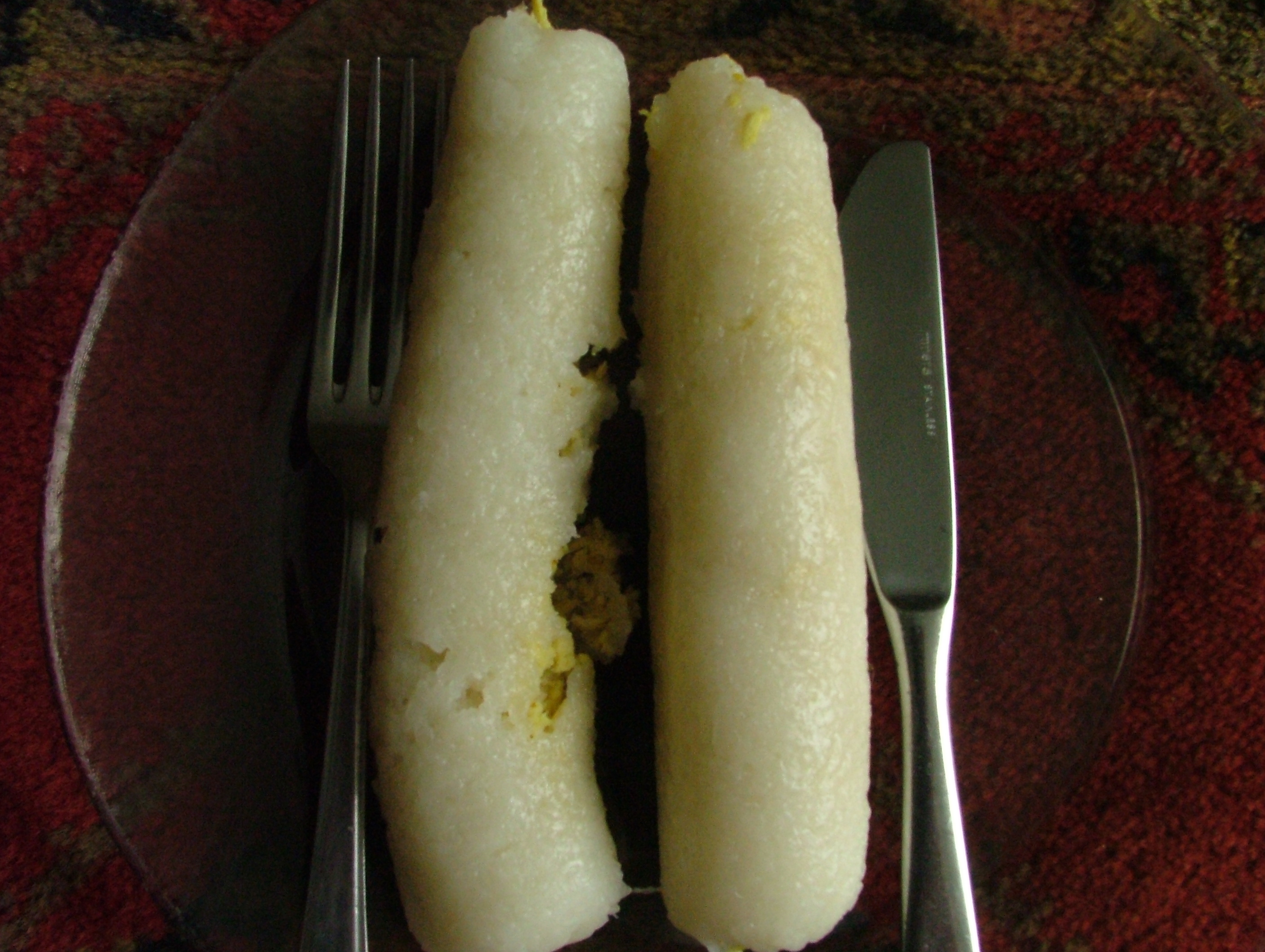 Lumper